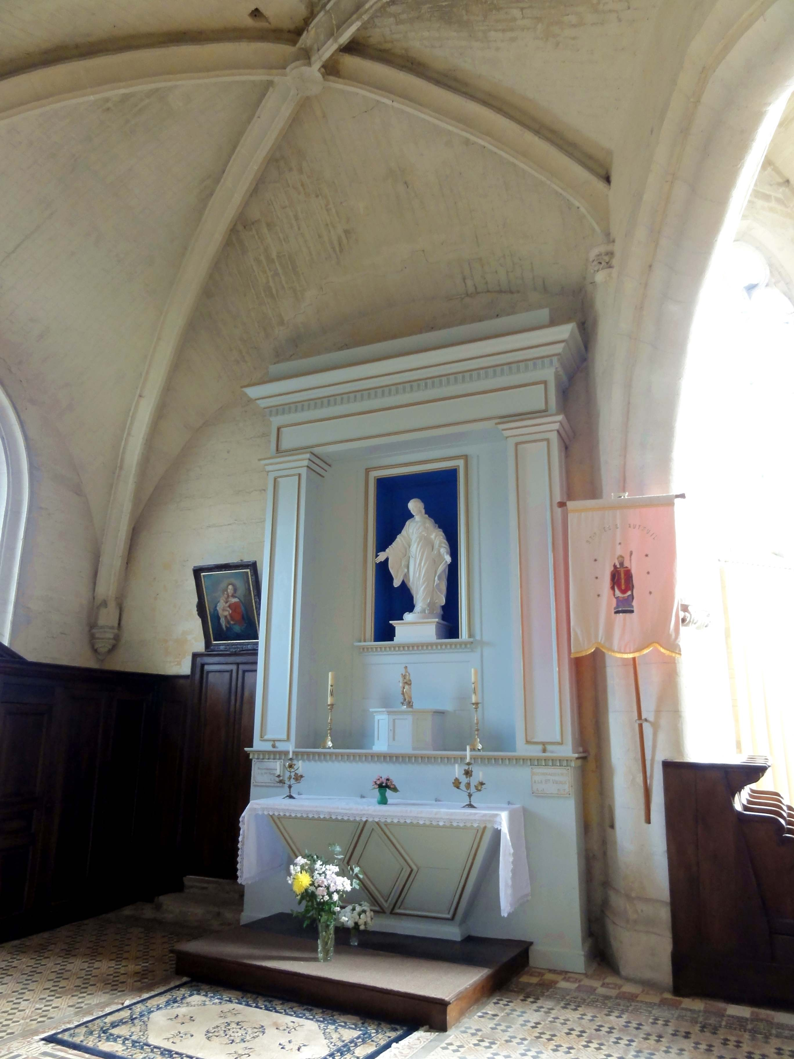 Voir titre.